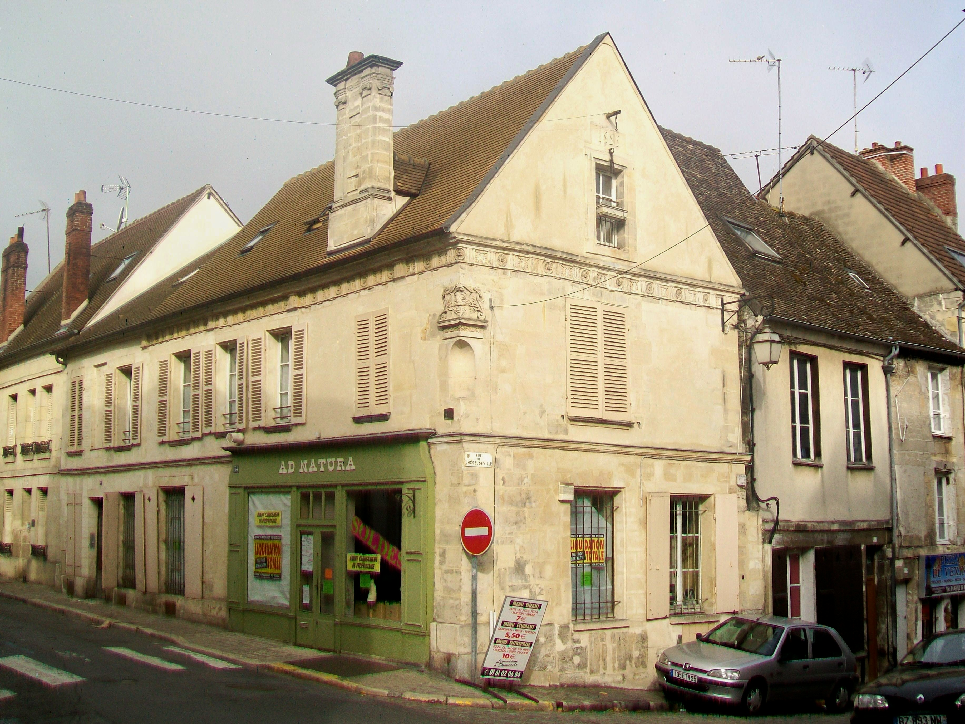 La maison Henri II de 1555, à l'angle rue de la Mairie / rue Carnot.